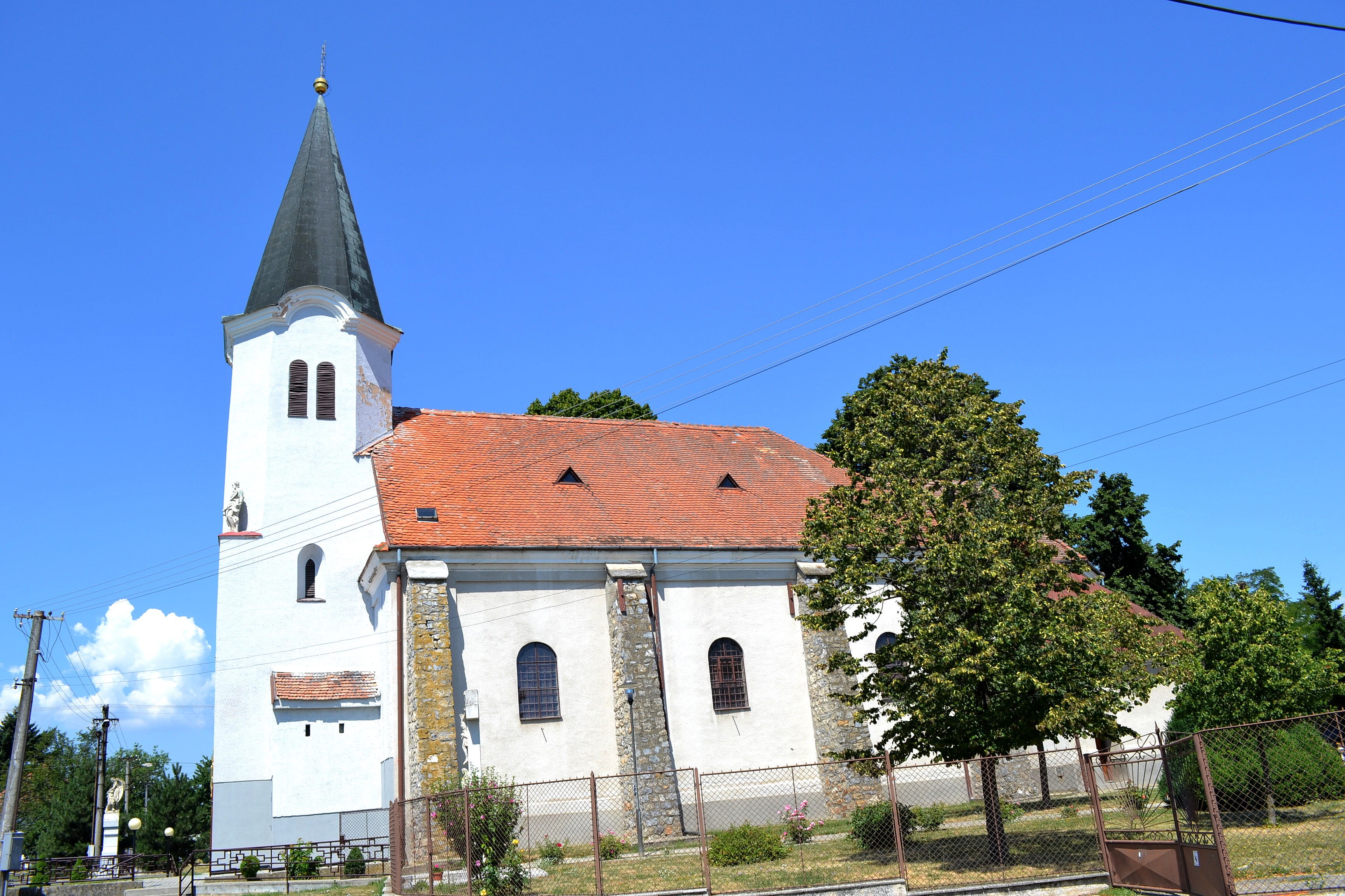 Vištuk (okr. Pezinok), Kostol Najsvätejšej Trojice; celkový pohľad